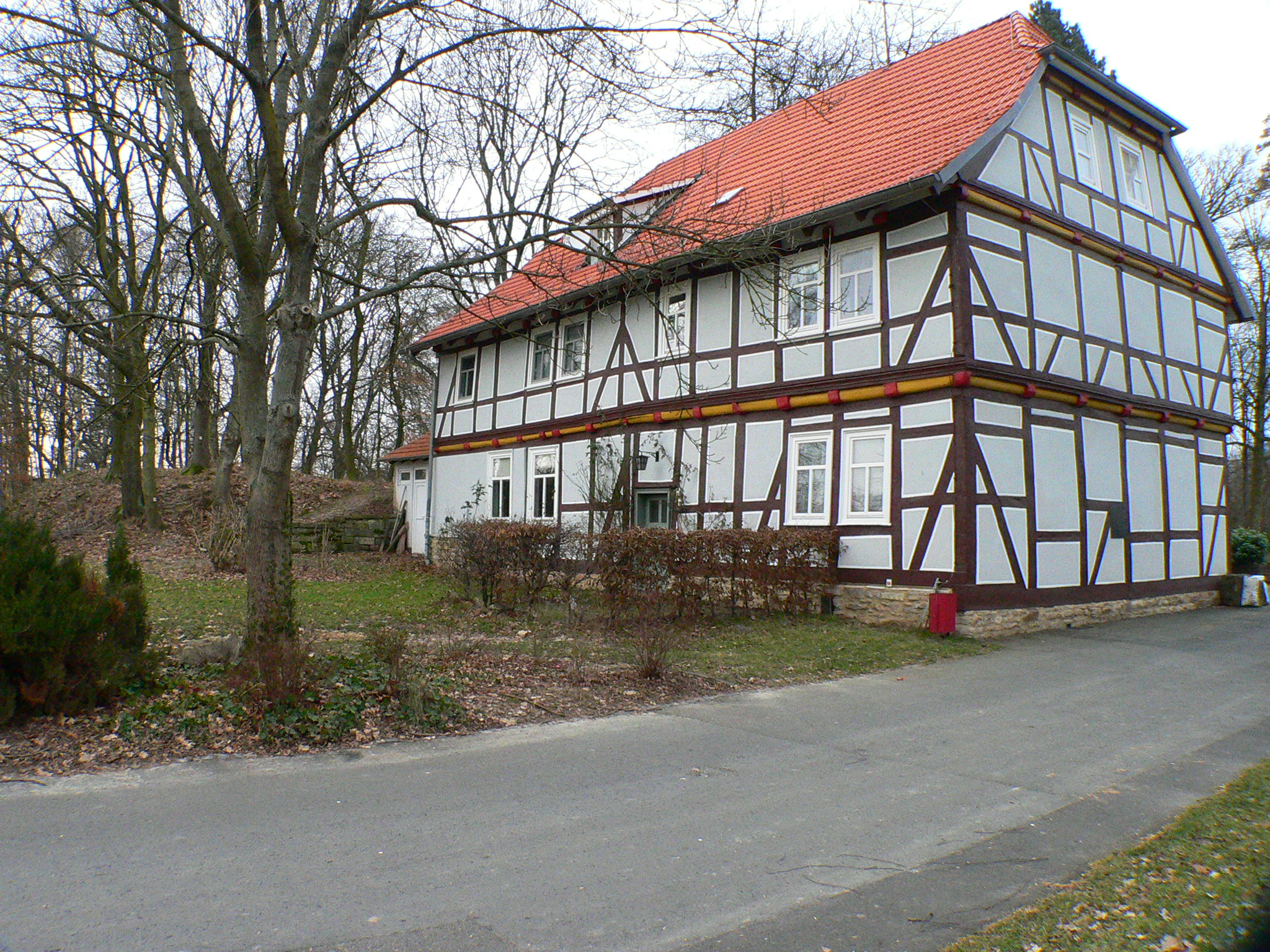 Ehemalige Burg Sensenstein: Ehemaliges Gutshaus von 1585, 1918- 1945 Gaststätte, an 1960 Verwaltung der Jugendbildungsstätte Kassel